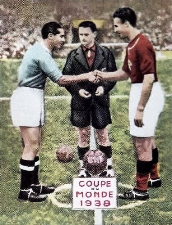 Meazza-Sarosi - Finale de la Coupe du monde de football 1938 à Paris.